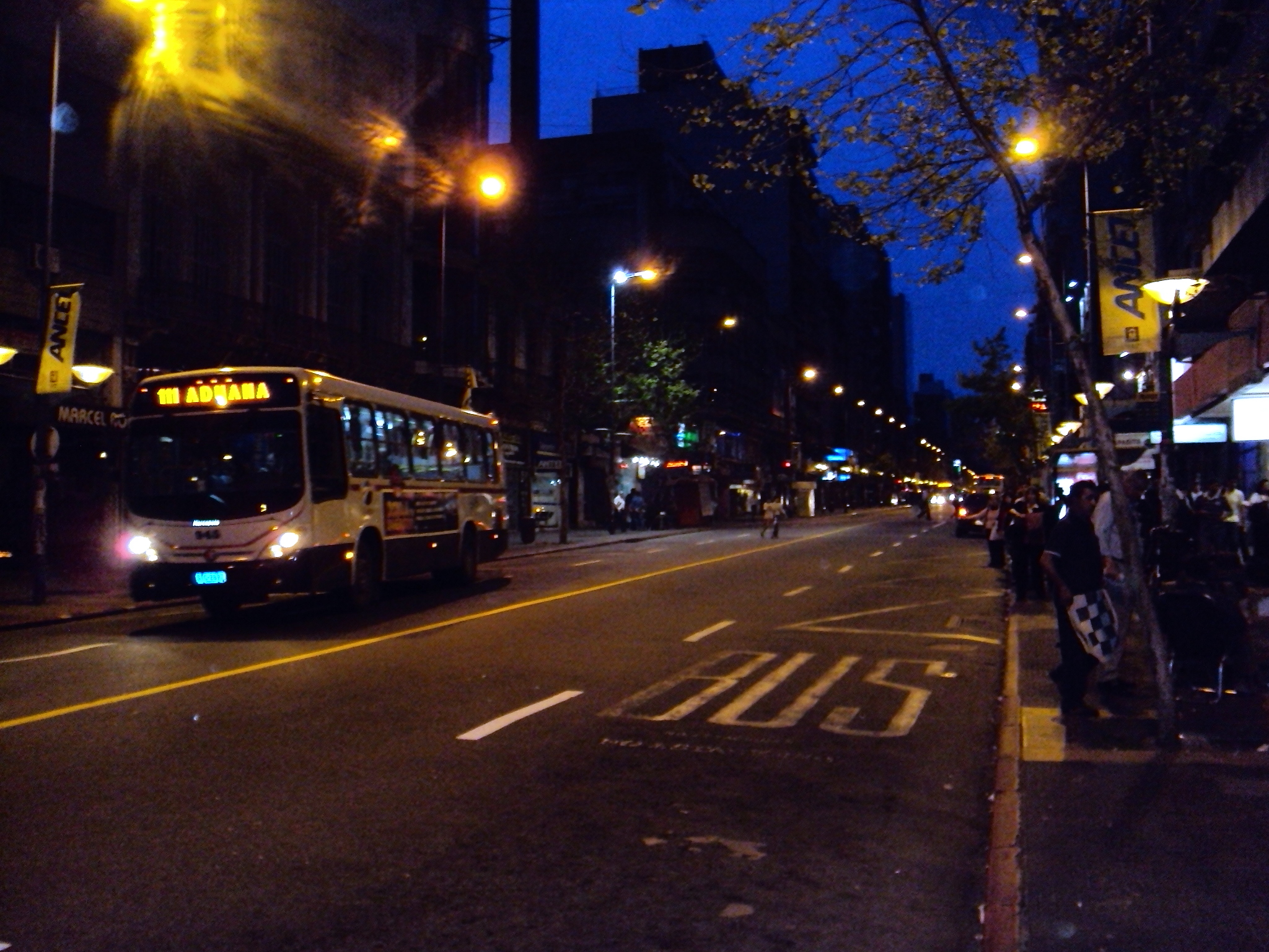 Vista Calle 18 de Julio atardecer